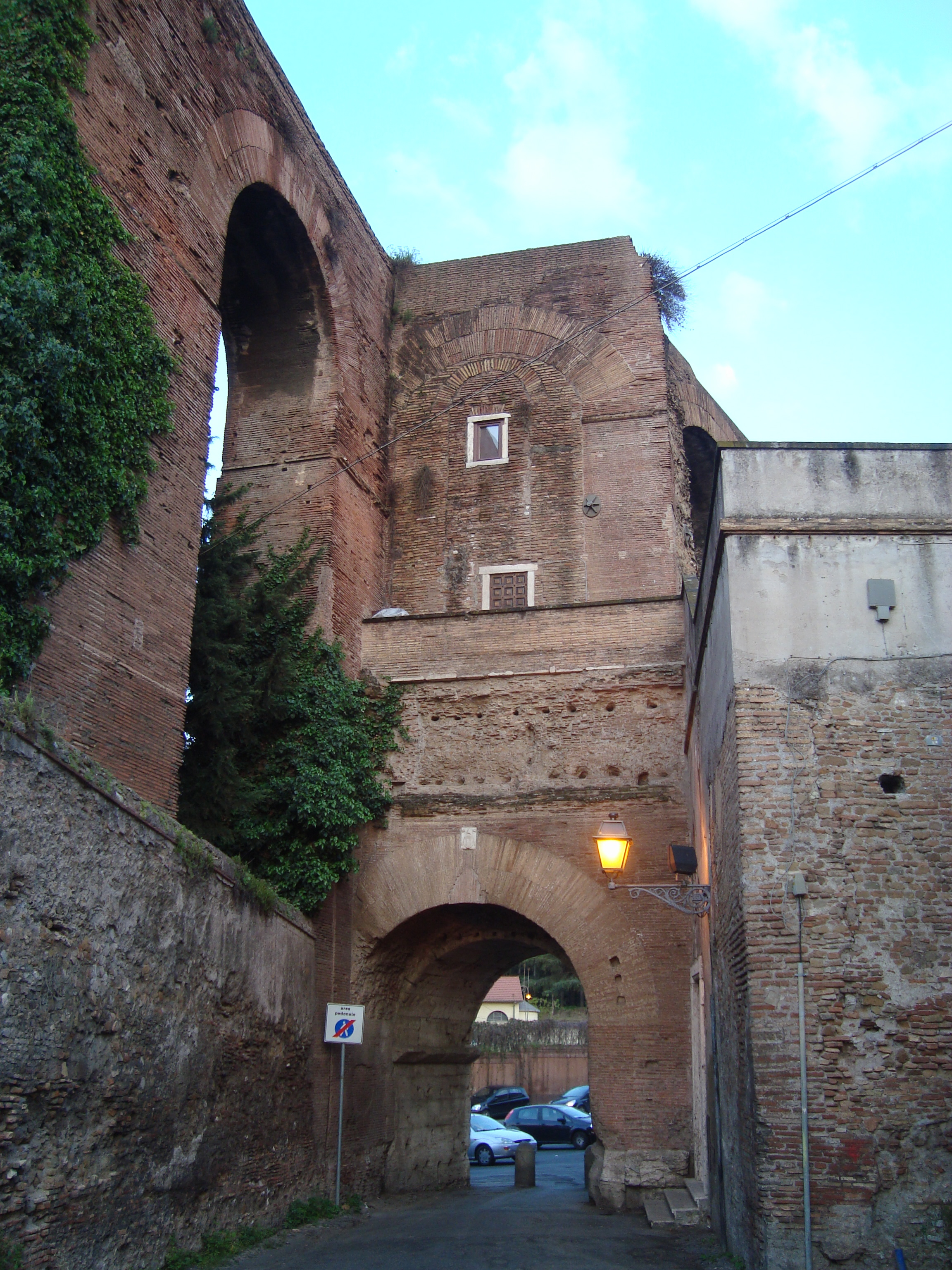 Vue de la face interne de la porta Caelimontana à Rome